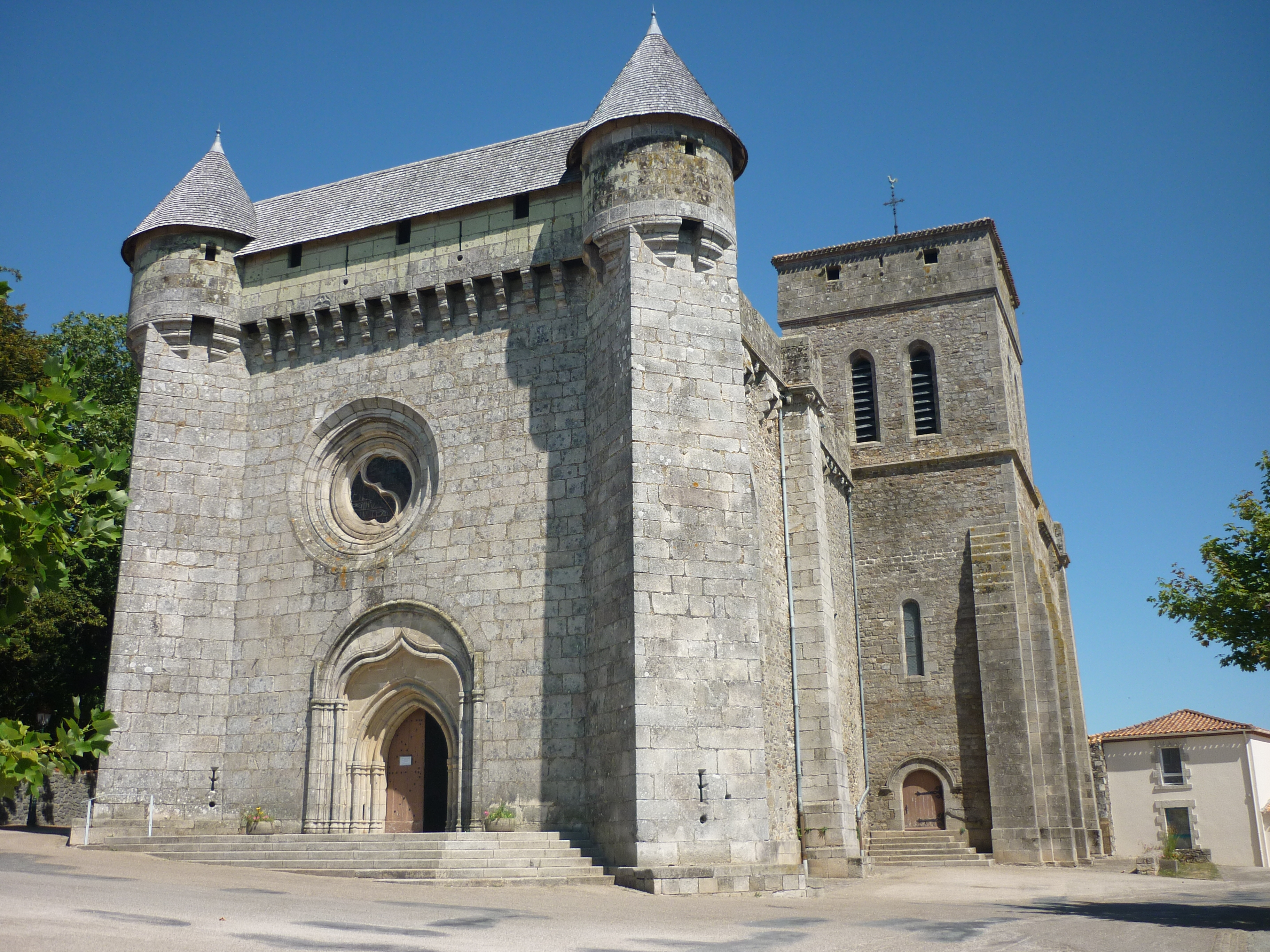 Eglise fortifiée du Boupère